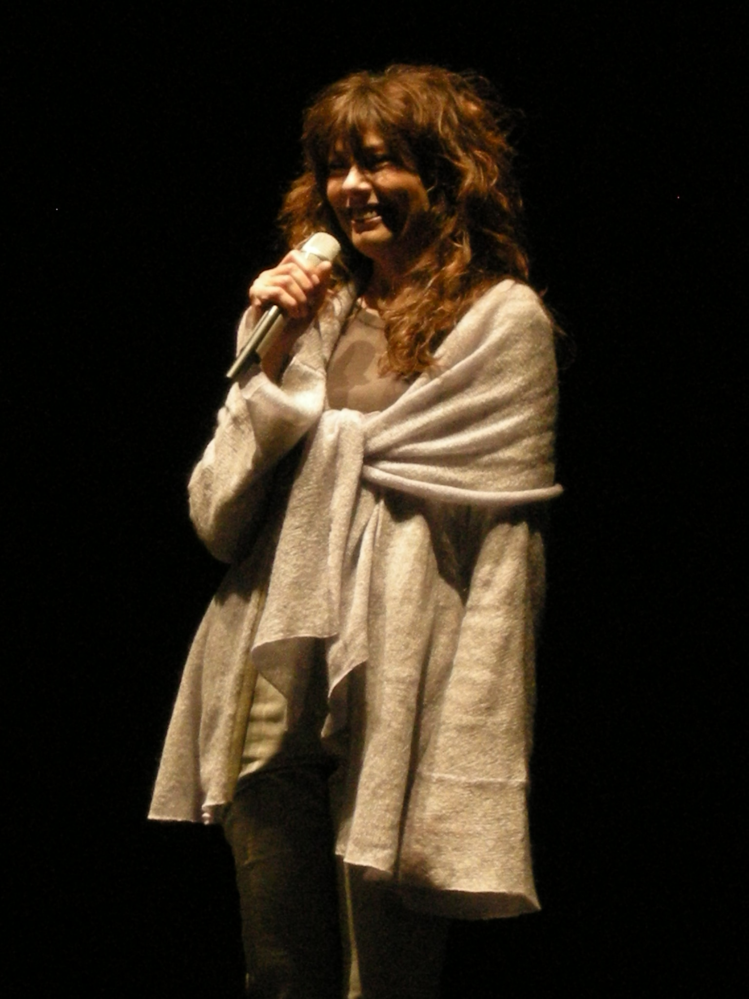 Alice @ Prato 20-03-09, 05